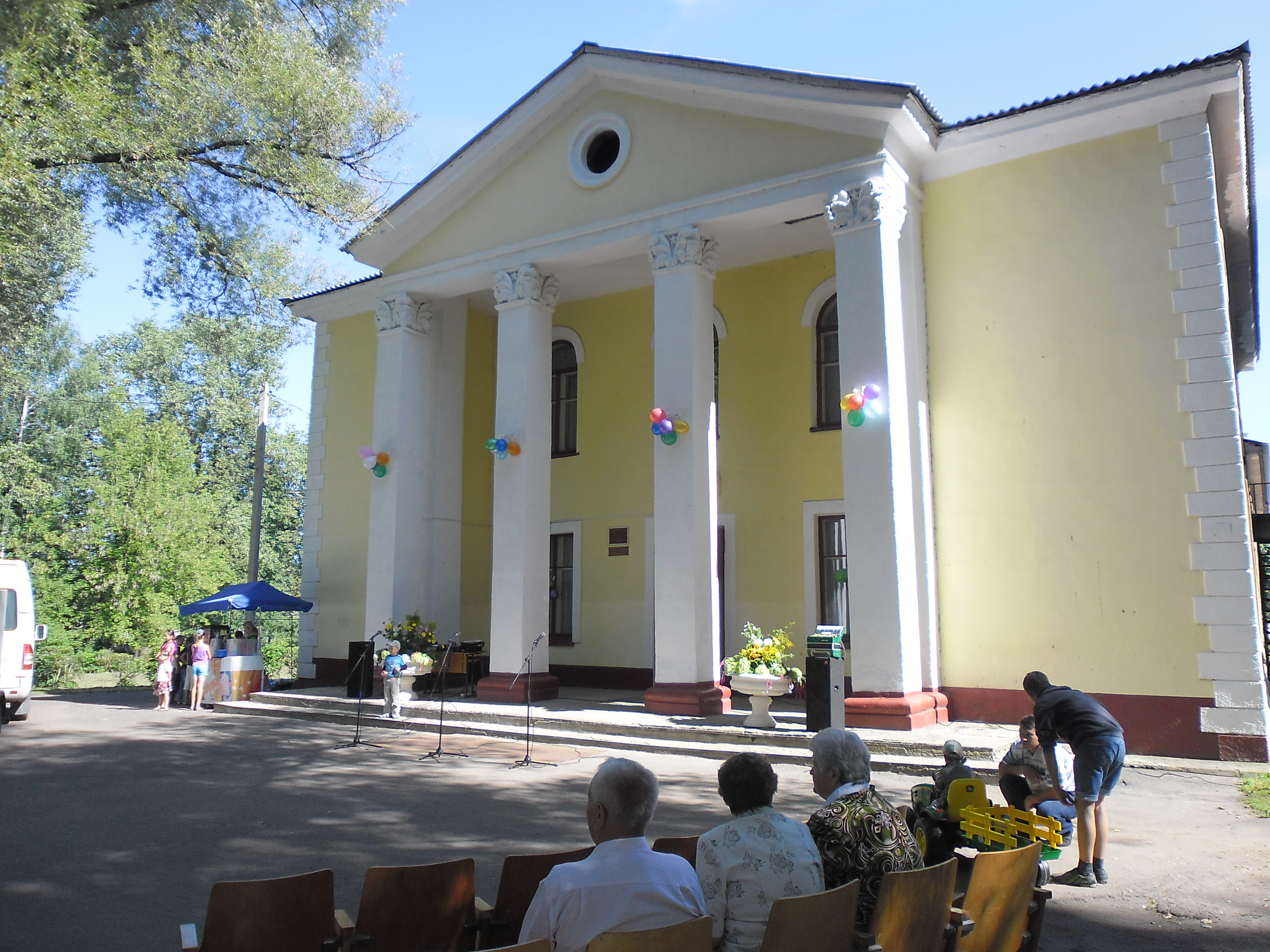 Усяж ДК